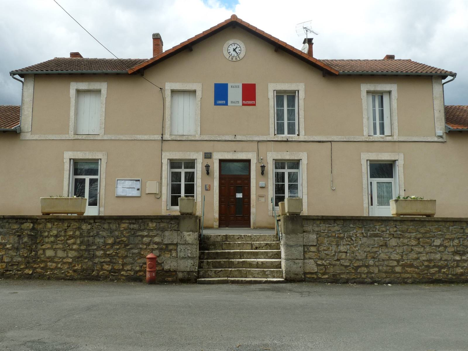 Mairie-école de Nieuil, Charente, France